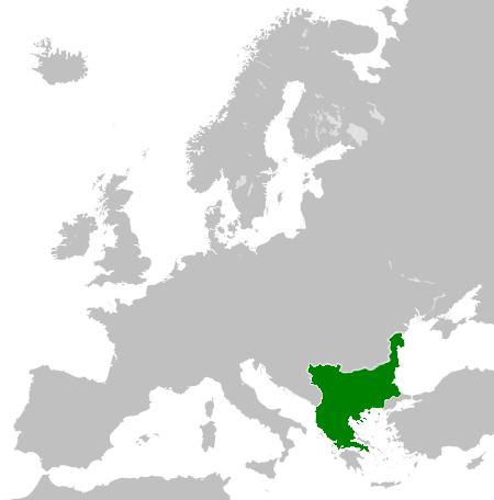 Второ Българско Царство